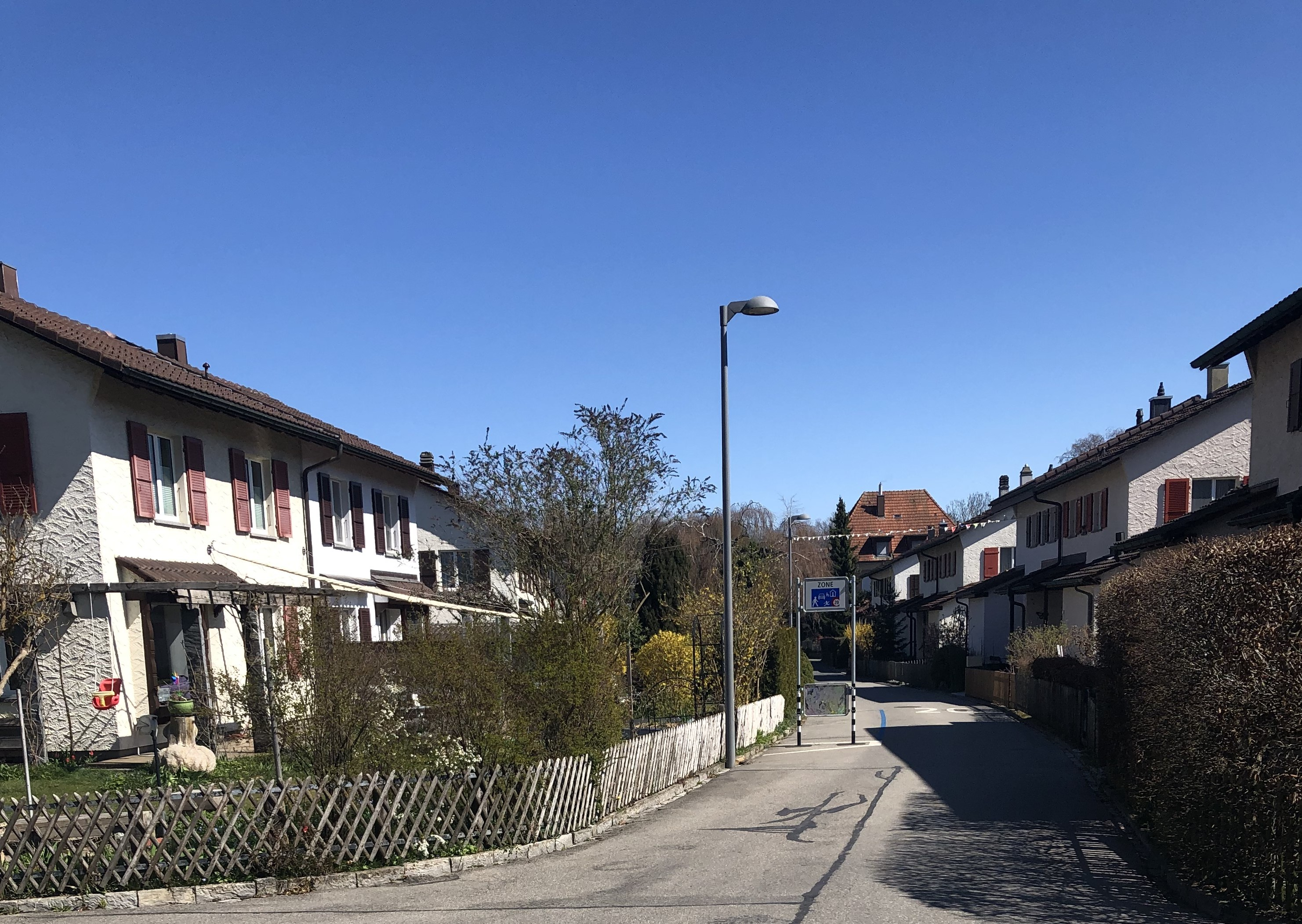 Siedlung Altes Bethlehem